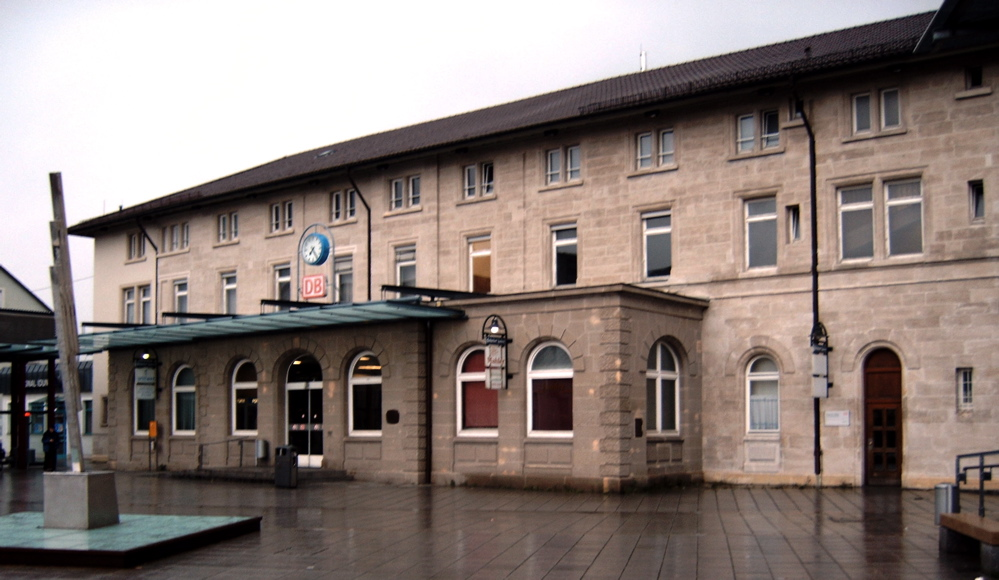 Bahnhof Aalen der Remsbahn, 2006